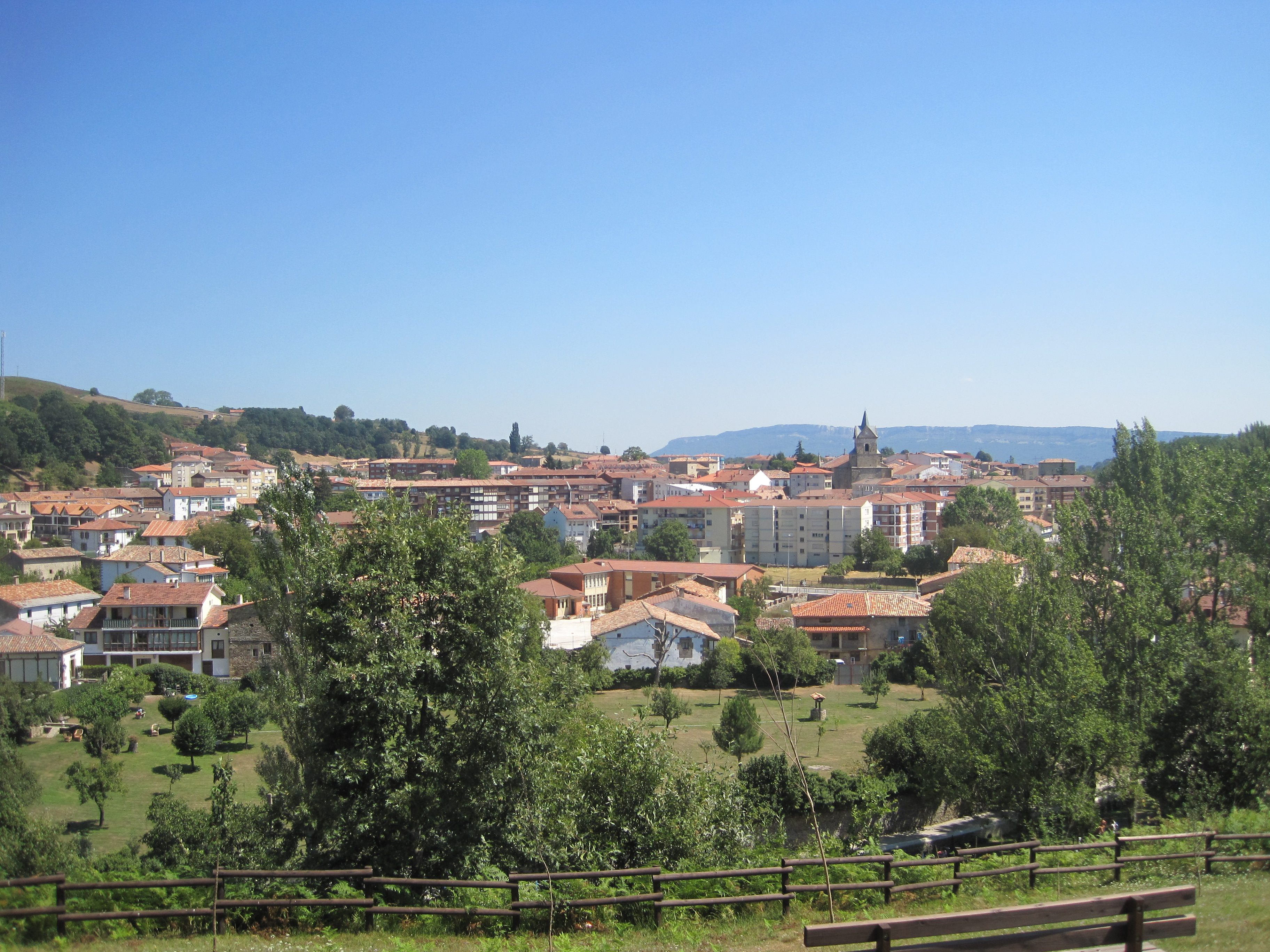 Vista panorámica desde el sur de Espinosa.